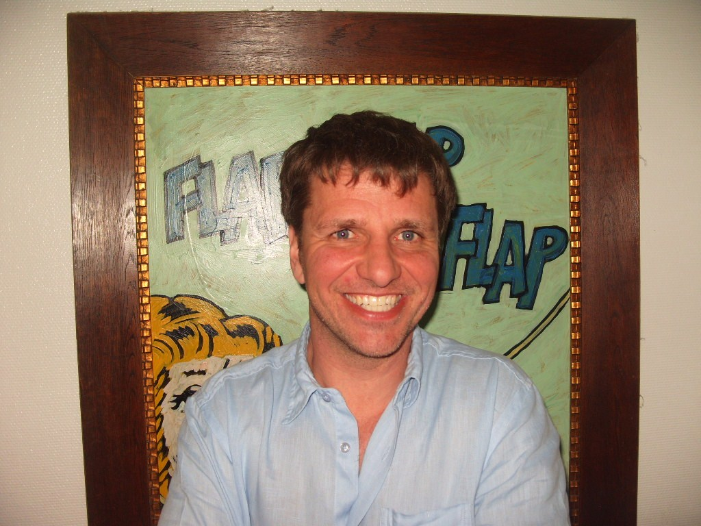 Frank Schaff nach einem Interview in Berlin